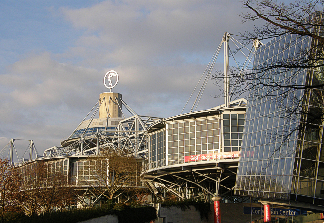 Auf dem Messegelände